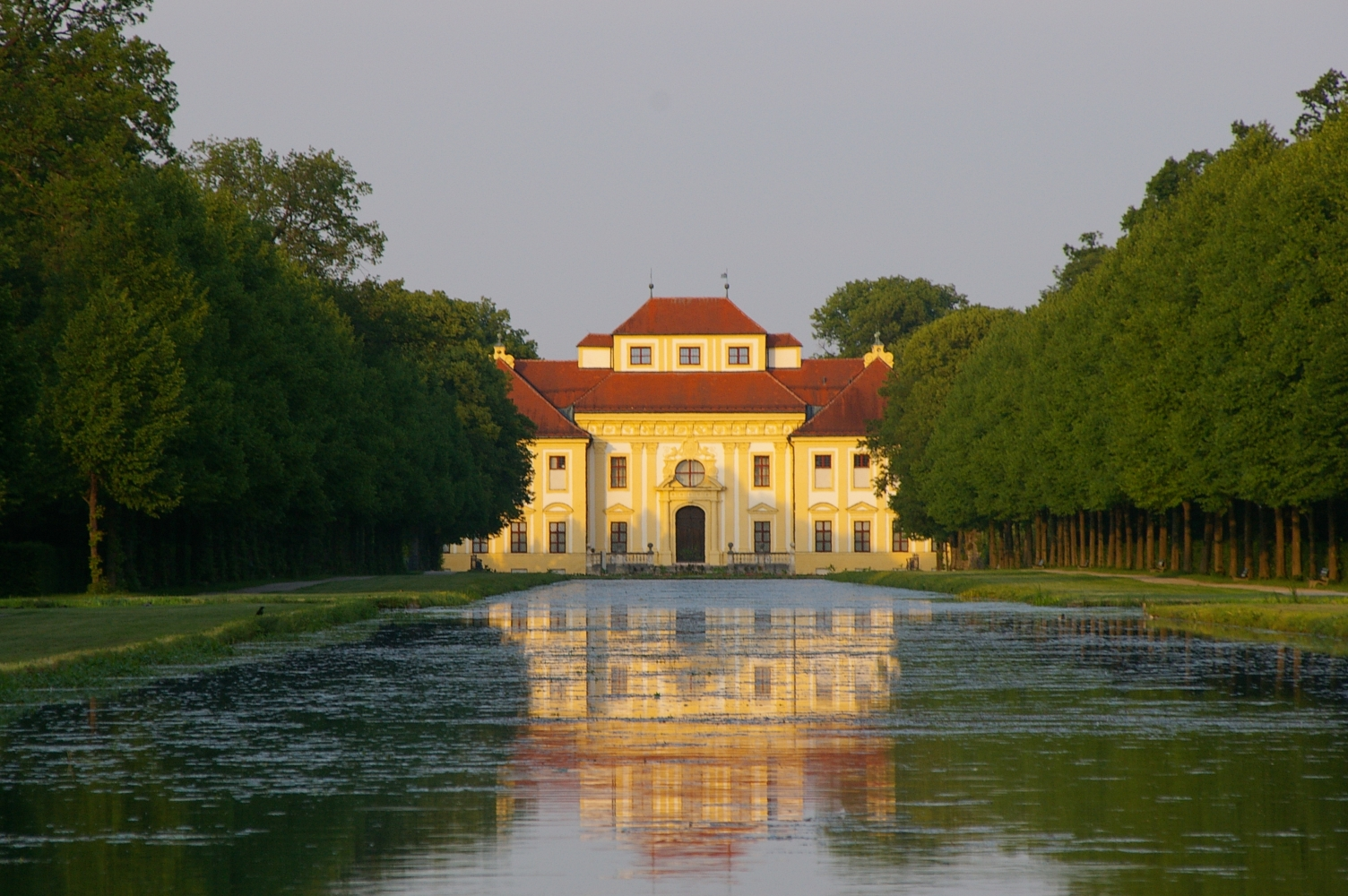 Schleißheim, Schloss Lustheim vom Neuen Schloss aus gesehen